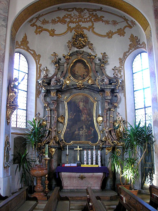 Pfarrkirche St. Michael (Mering, Landkreis Aichach-Friedberg, Bayerisch-Schwaben). Blick in die nördliche Kapelle. Eigene Aufnahme, März 2007 / Parish church St. Michael (Mering near Augsburg, Bavaria, Germany). Interior, looking into the northern chapel. Own photo, March 2007